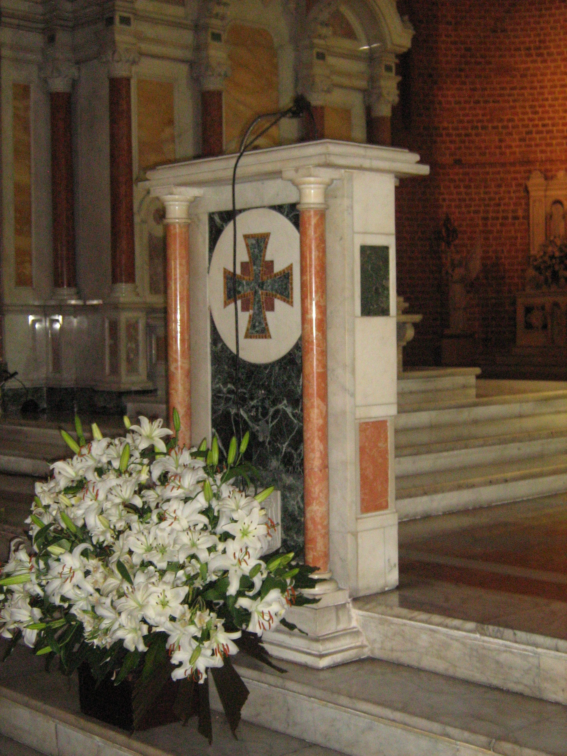 Ambón de la Catedral Metropolitana de Medellín. Colombia